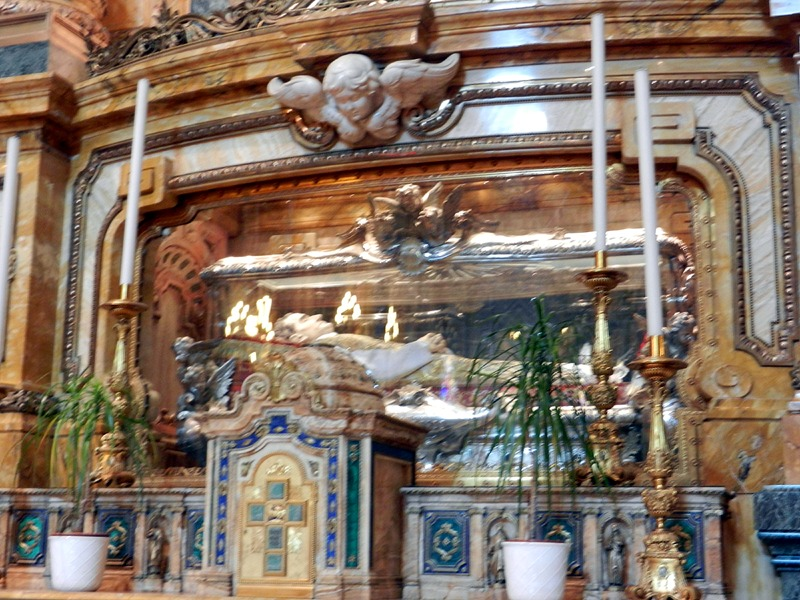 Torino - Tomba di S. Giovanni Bosco all'interno del Santuario di S. Maria Ausiliatrice